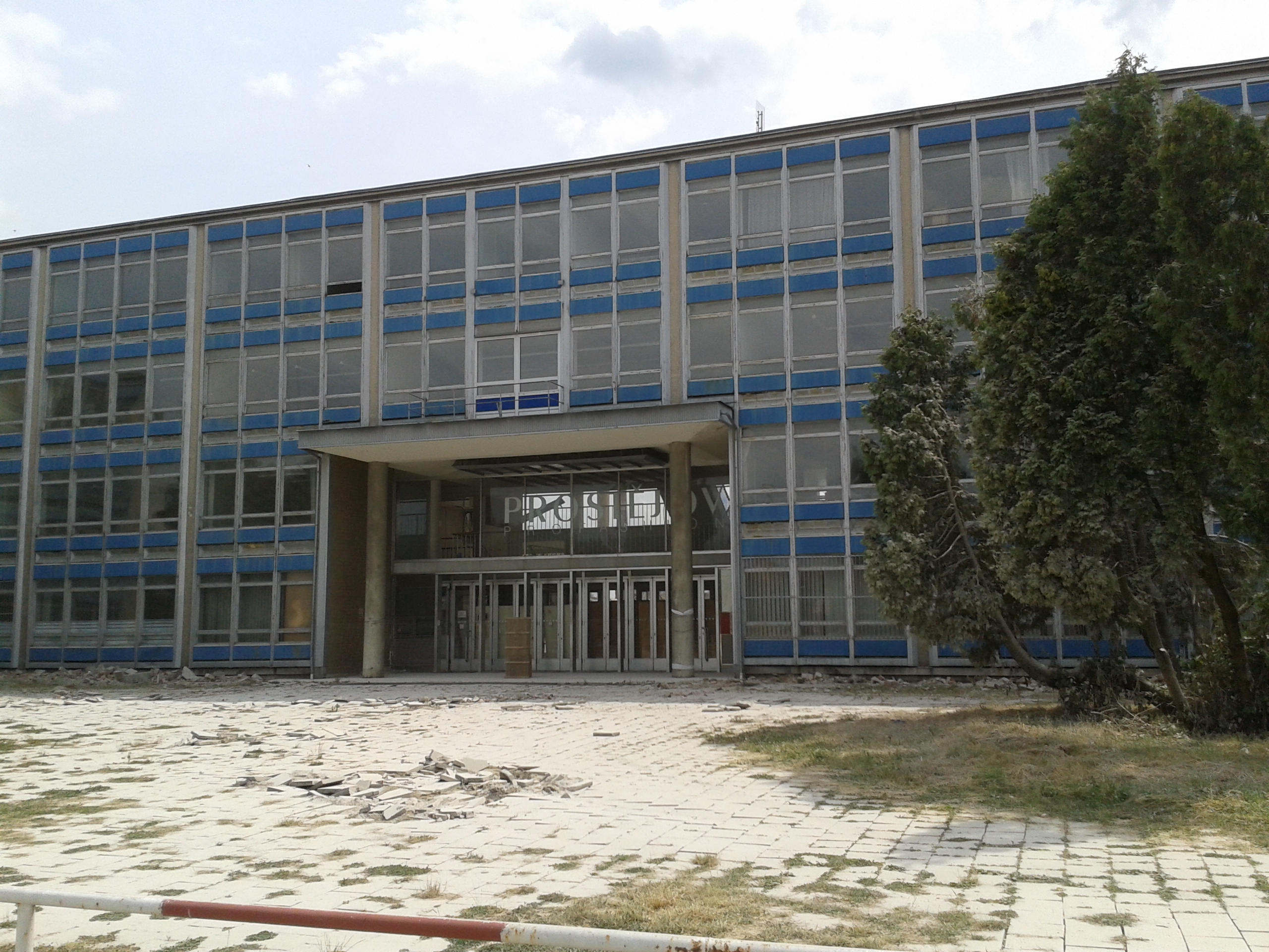 OP Prostějov